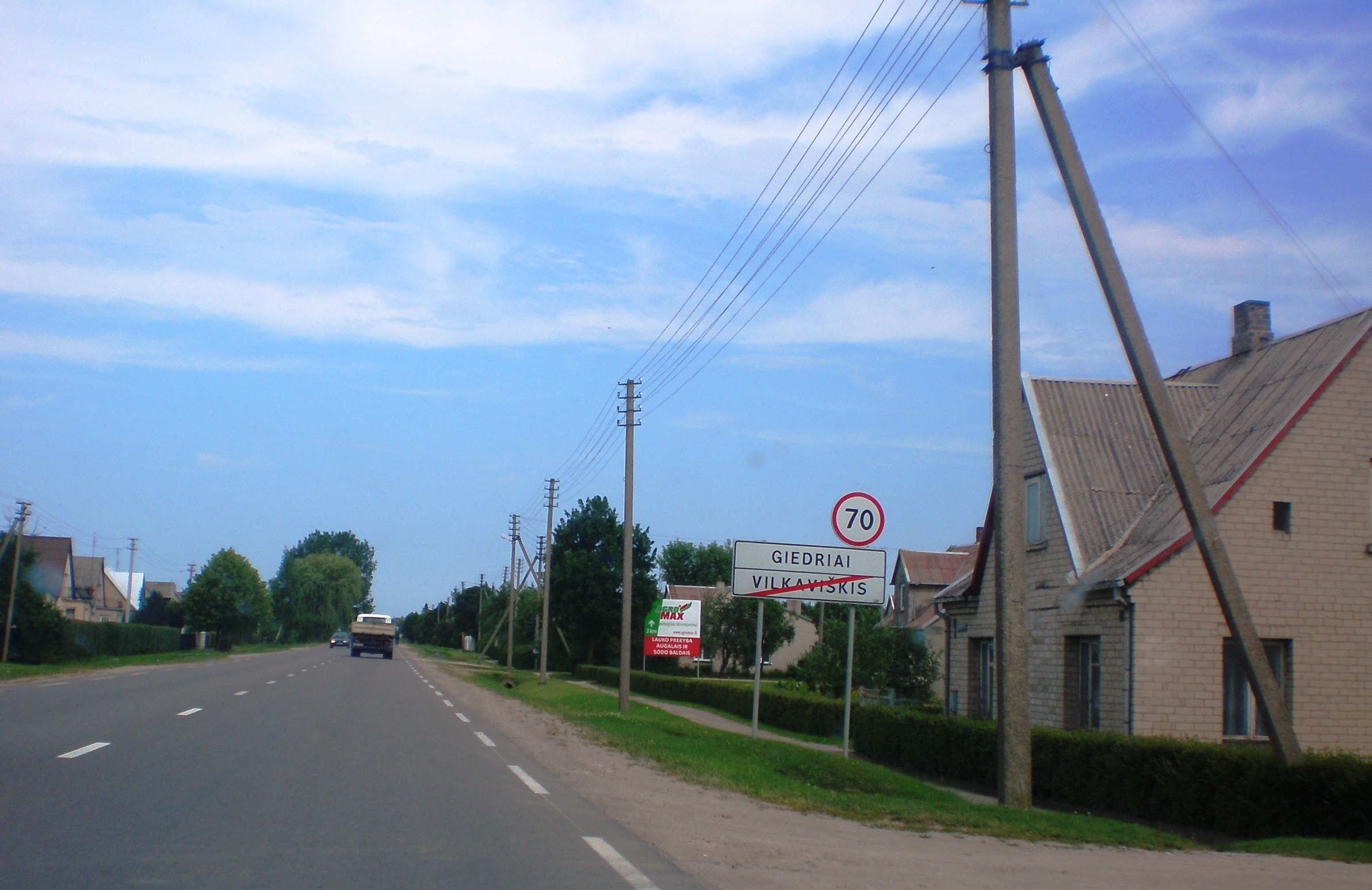 Giedriai, Vilkaviškio raj.